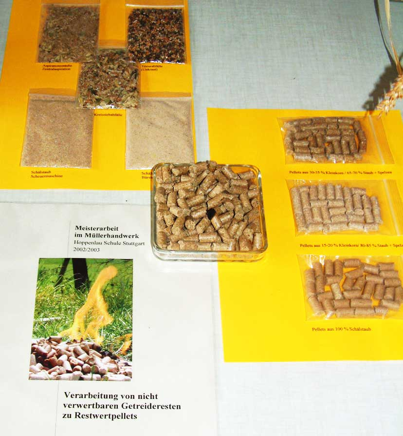 Beschreibung: Restwert-Pellets Fotograf: Benutzer:burgkirsch 2003 Quellenangabe und Beleg an burgkirsch(at)web.de erbeten.